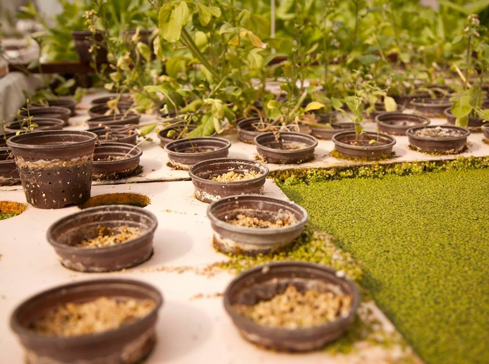 Կանաչ բազիլիկ հայկական ակվապոնիկ ջերմոցում